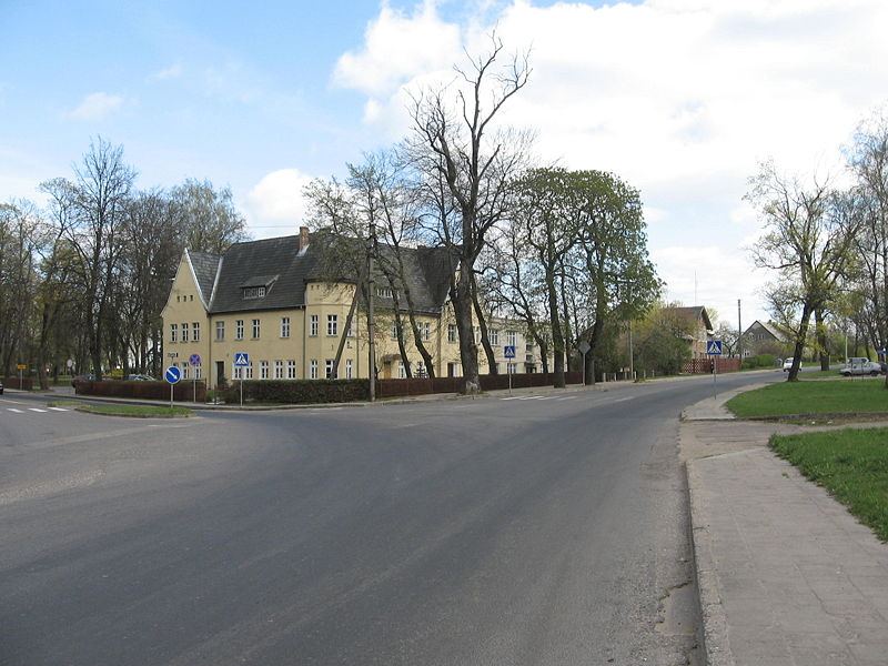 Verdainiai